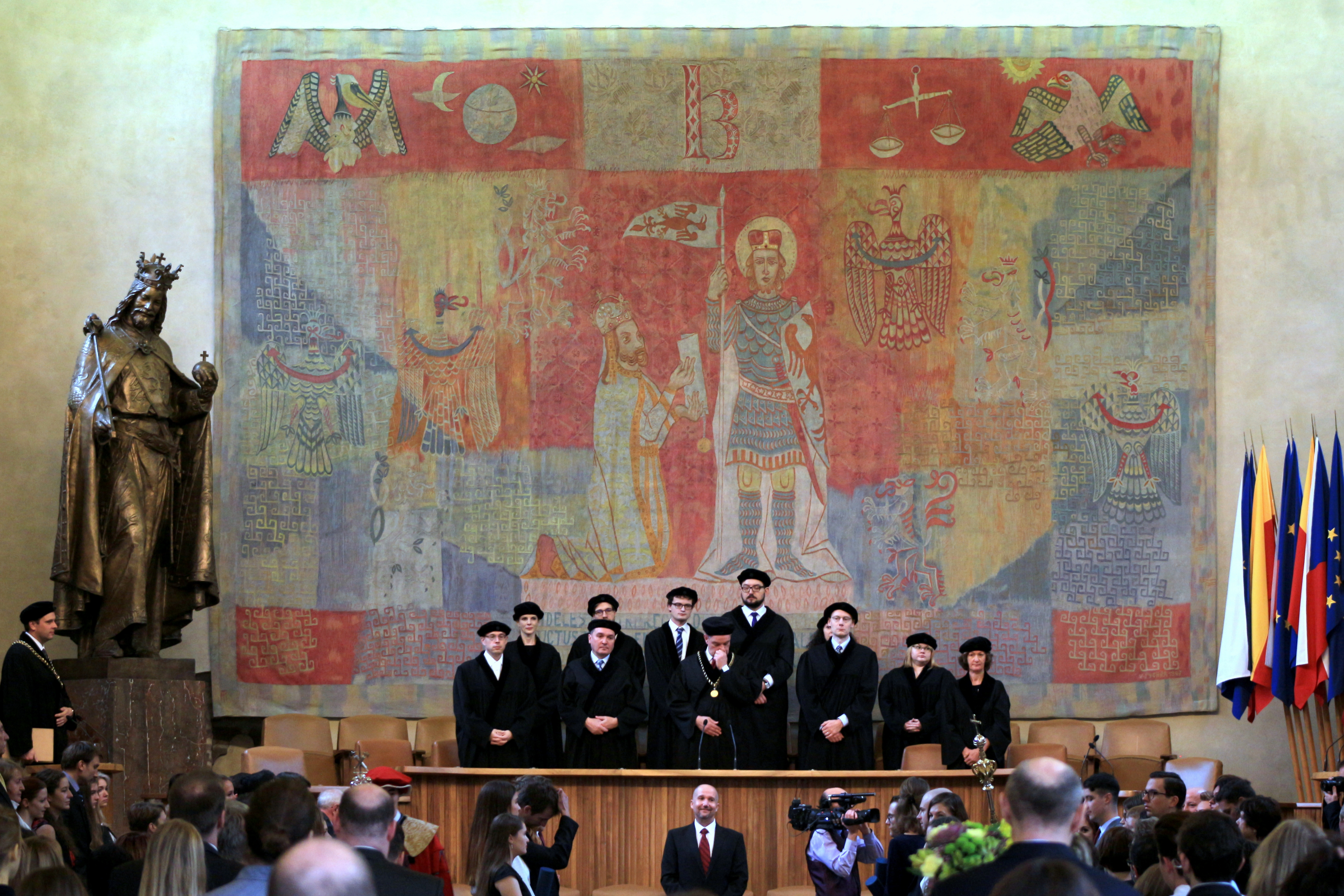 Karolinum, velká aula